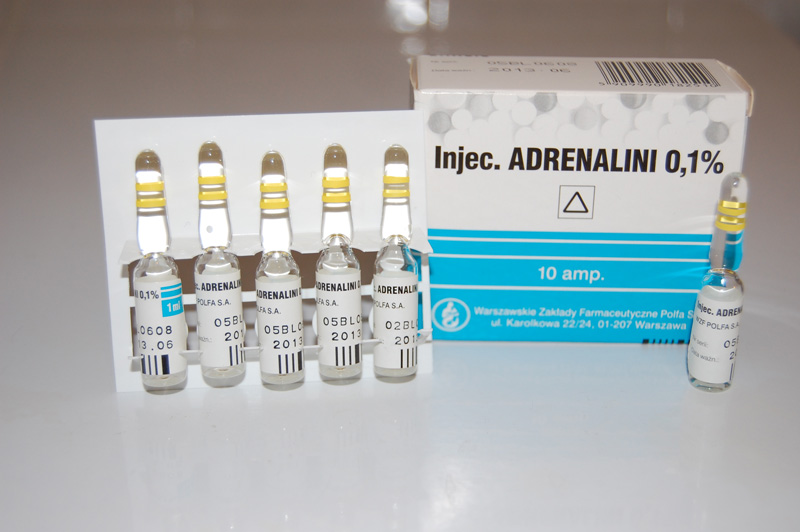 Adrenalina / Epinephrine - ADRENALINI 0,1% (WZF)